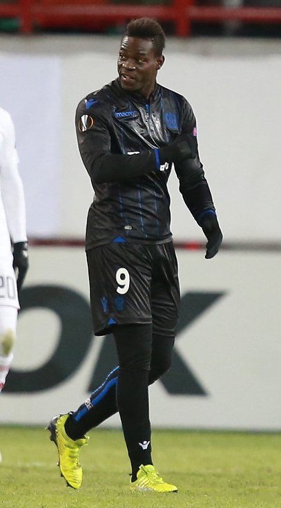 «Локомотив» положил на лопатки «Ниццу» в Москве